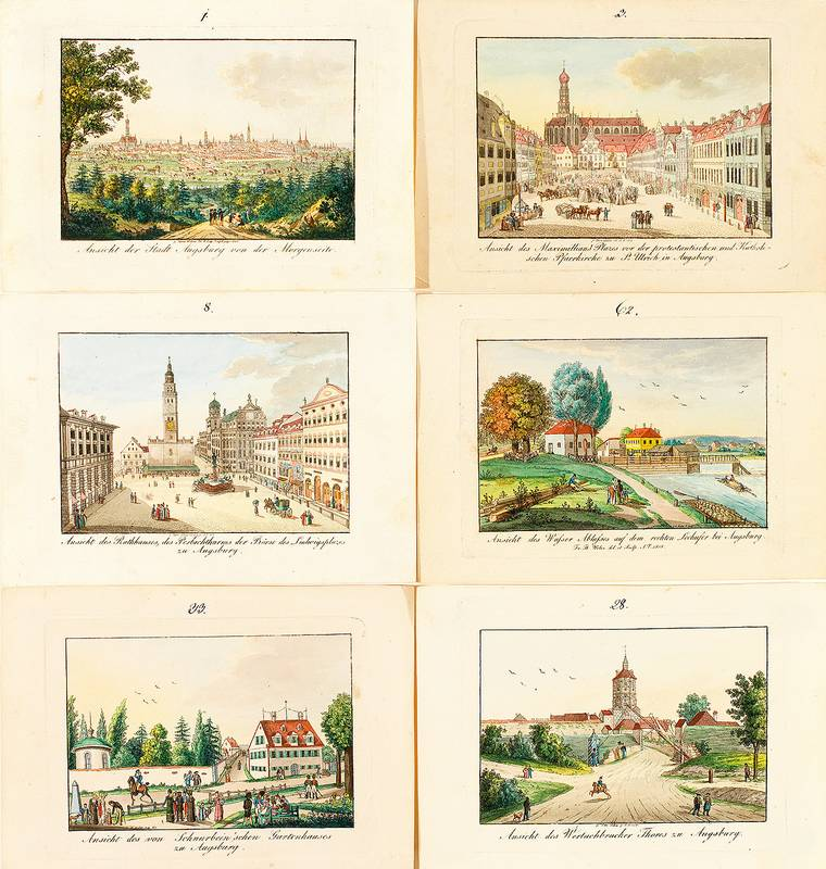 Augsburg und Umgebung. Kolorierte Radierungen